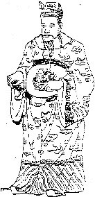 Trịnh Kiểm